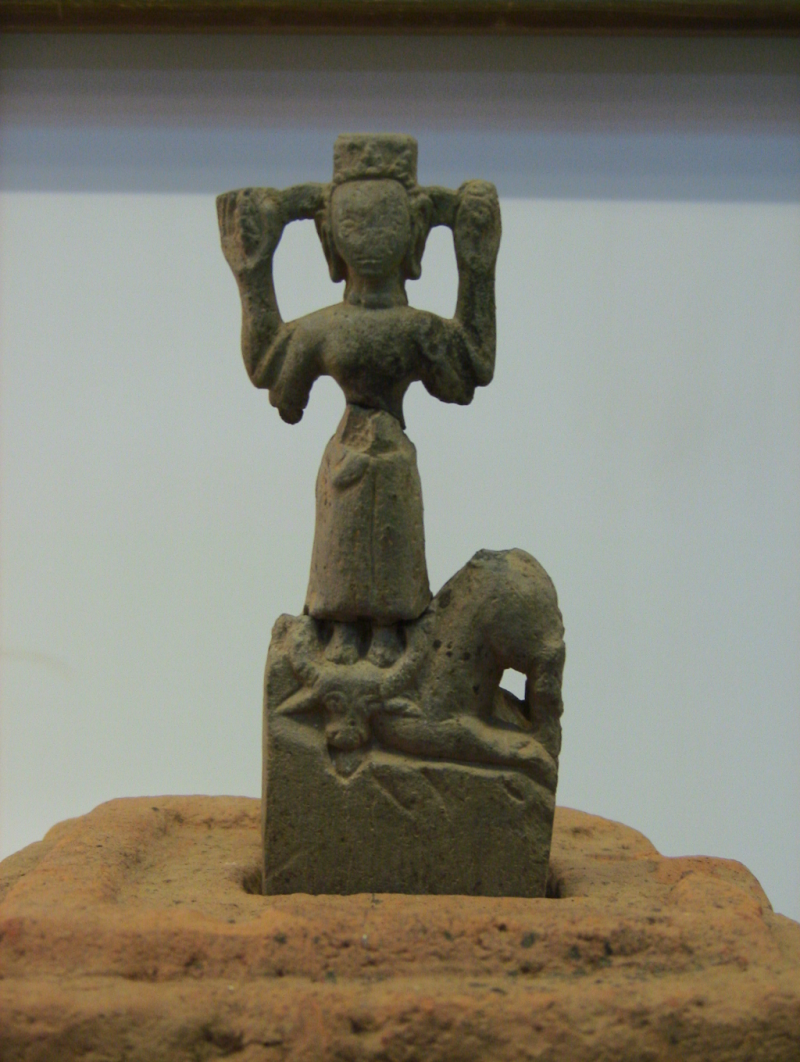 Tượng nữ thần Uma cưỡi quỷ trâu Mahisa, tìm thấy tại Cát Tiên. A statue of Uma goddes riding the Mahisa buffalo monster found in Cát Tiên sanctuary.